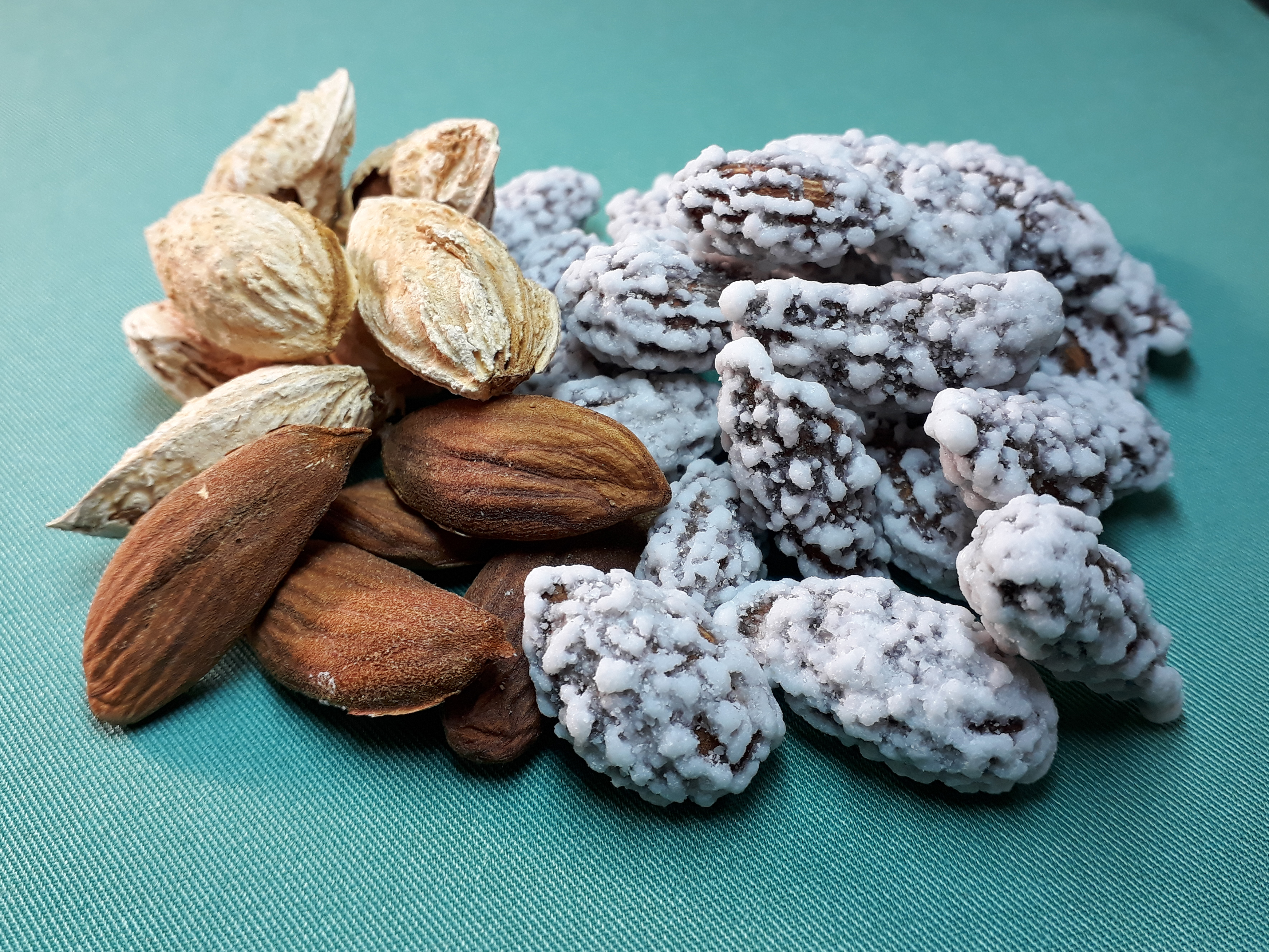 Тоҷикӣ: Бодомқандак